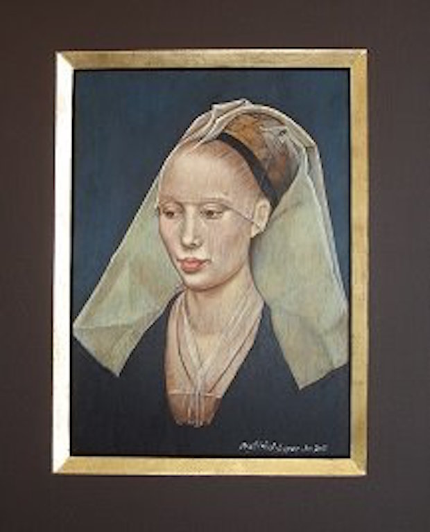 Kopie